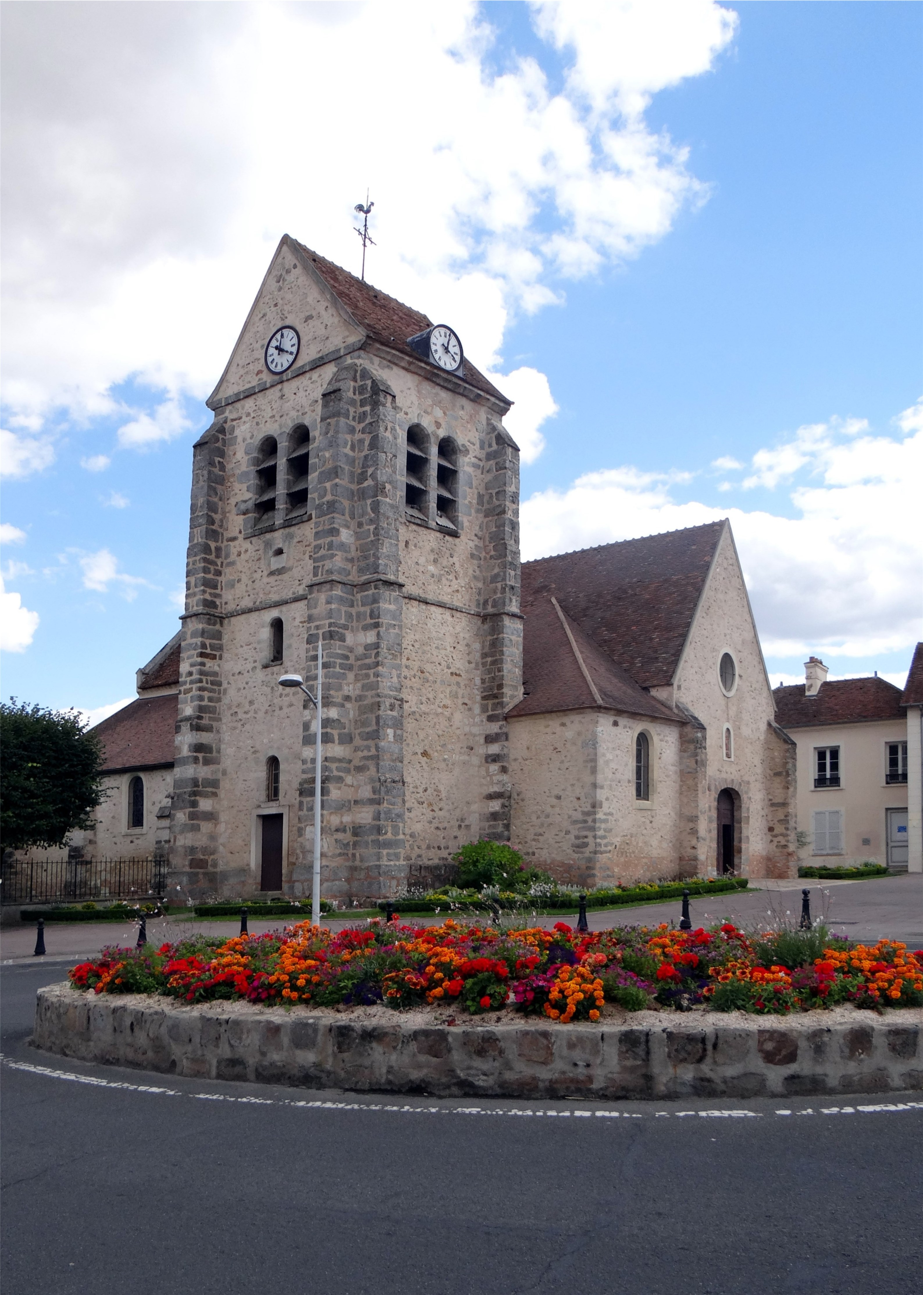 Église Notre-Dame-de-l’Assomption, Moissy-Cramayel, Sein-et-Marne, France.